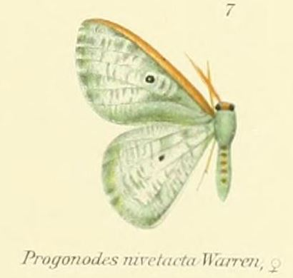 Oospila nivetacta (Warren 1906)